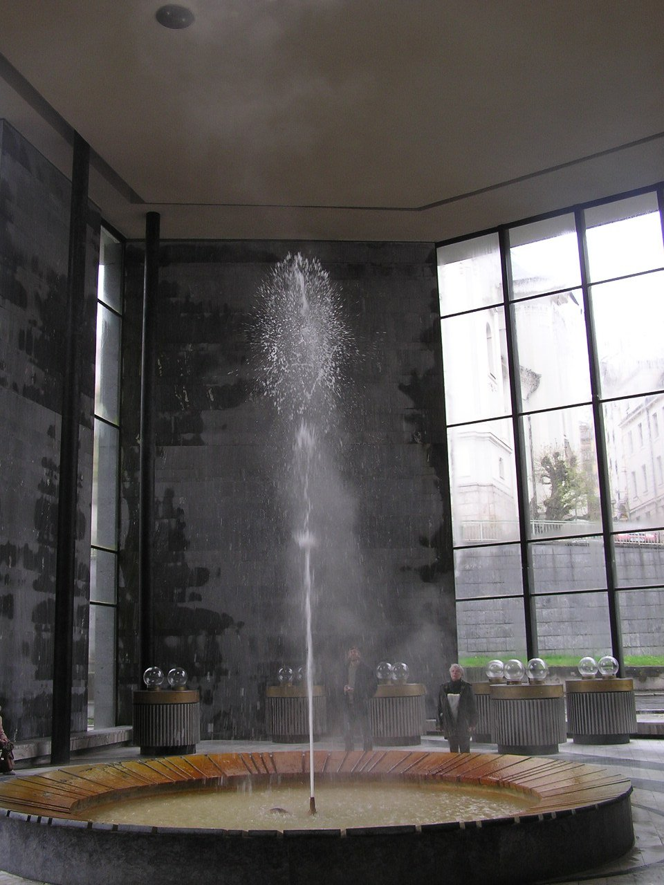 A hot spring in Karlovy Vary